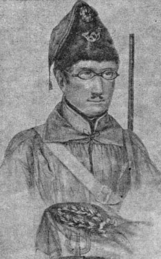 Jenneval